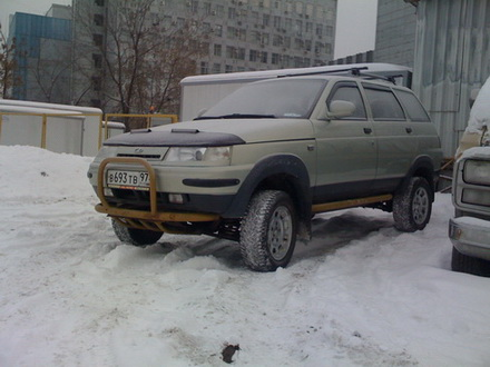 Тарзан-2.